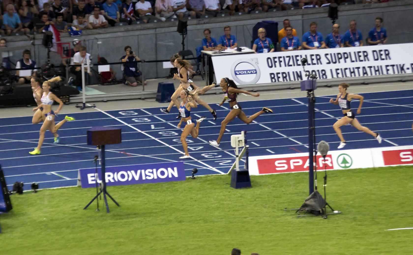 EKB31792 nafi 200m